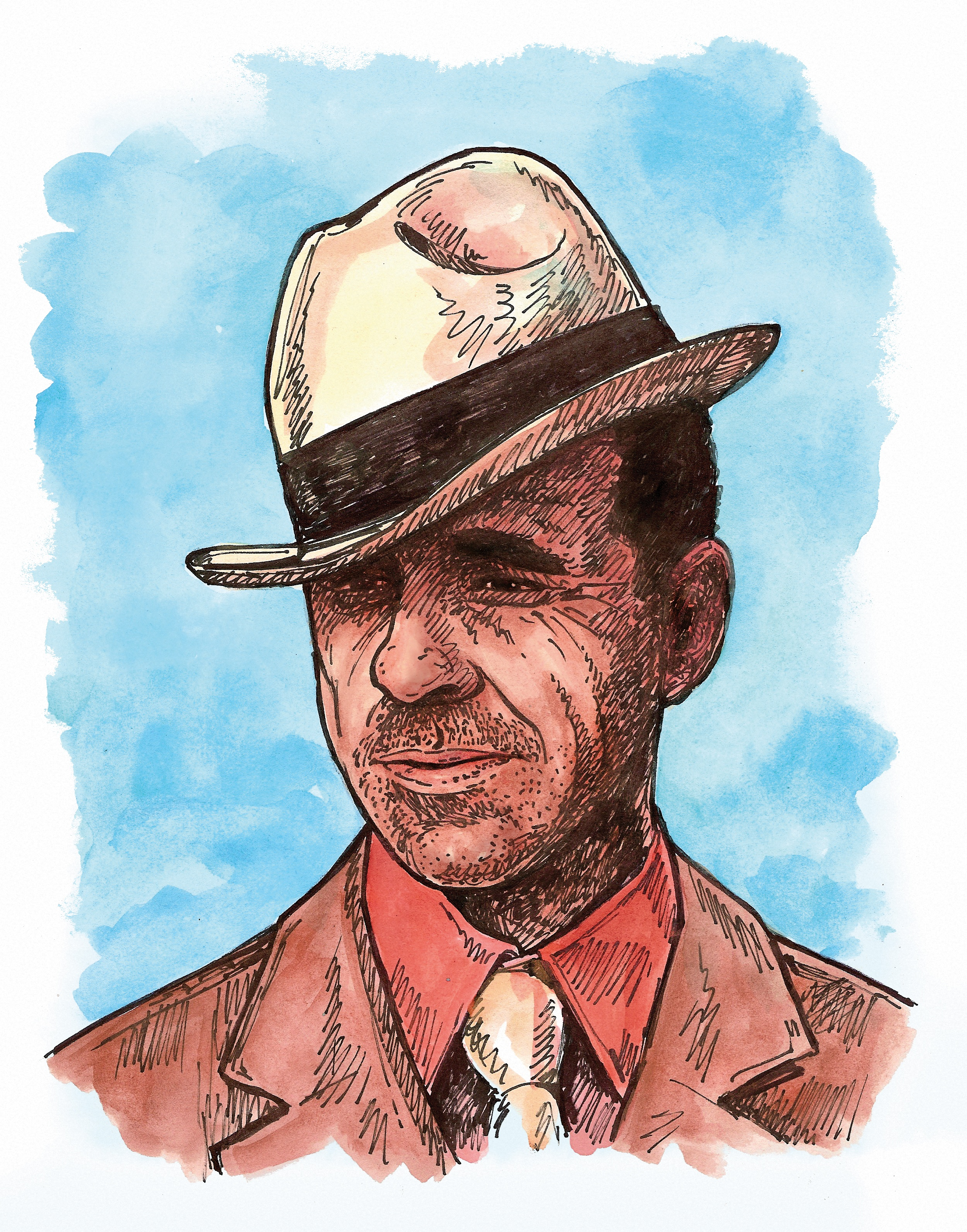 František Peterka (herec), kolorovaná perokresba.